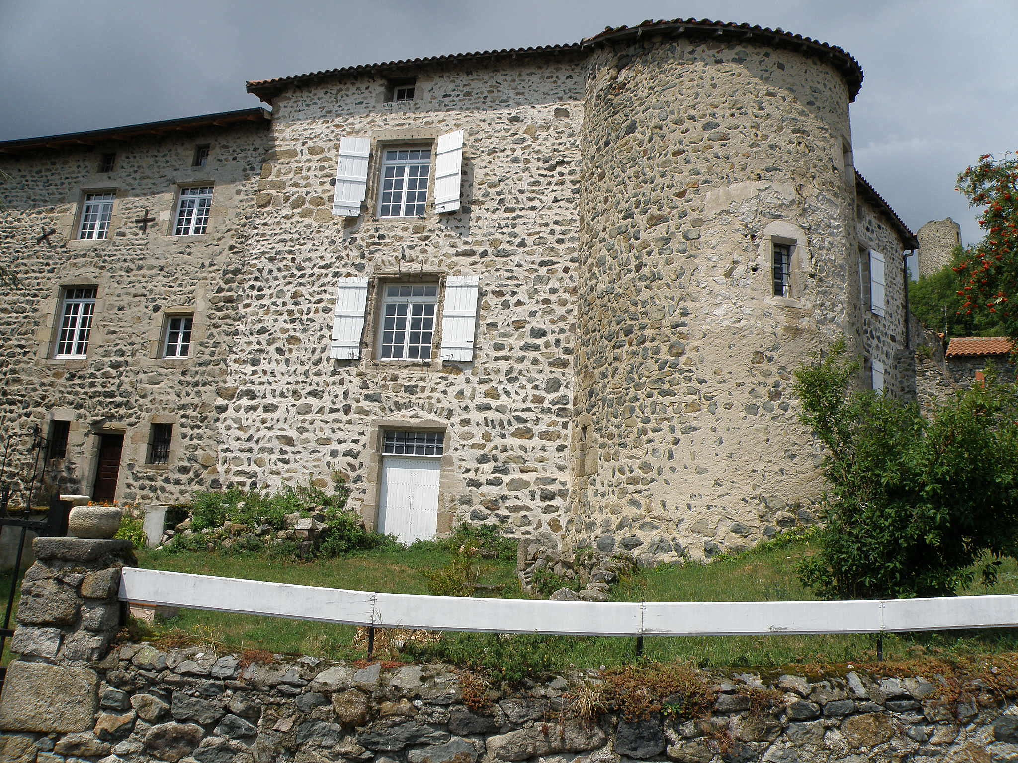 Roche-en-Régnier, comm. de la Haute-Loire, France (Auvergne). La Grande Bâtisse, autrefois maison adossée à la muraille d'enceinte. Remarquer au fond à droite la tour circulaire du château.